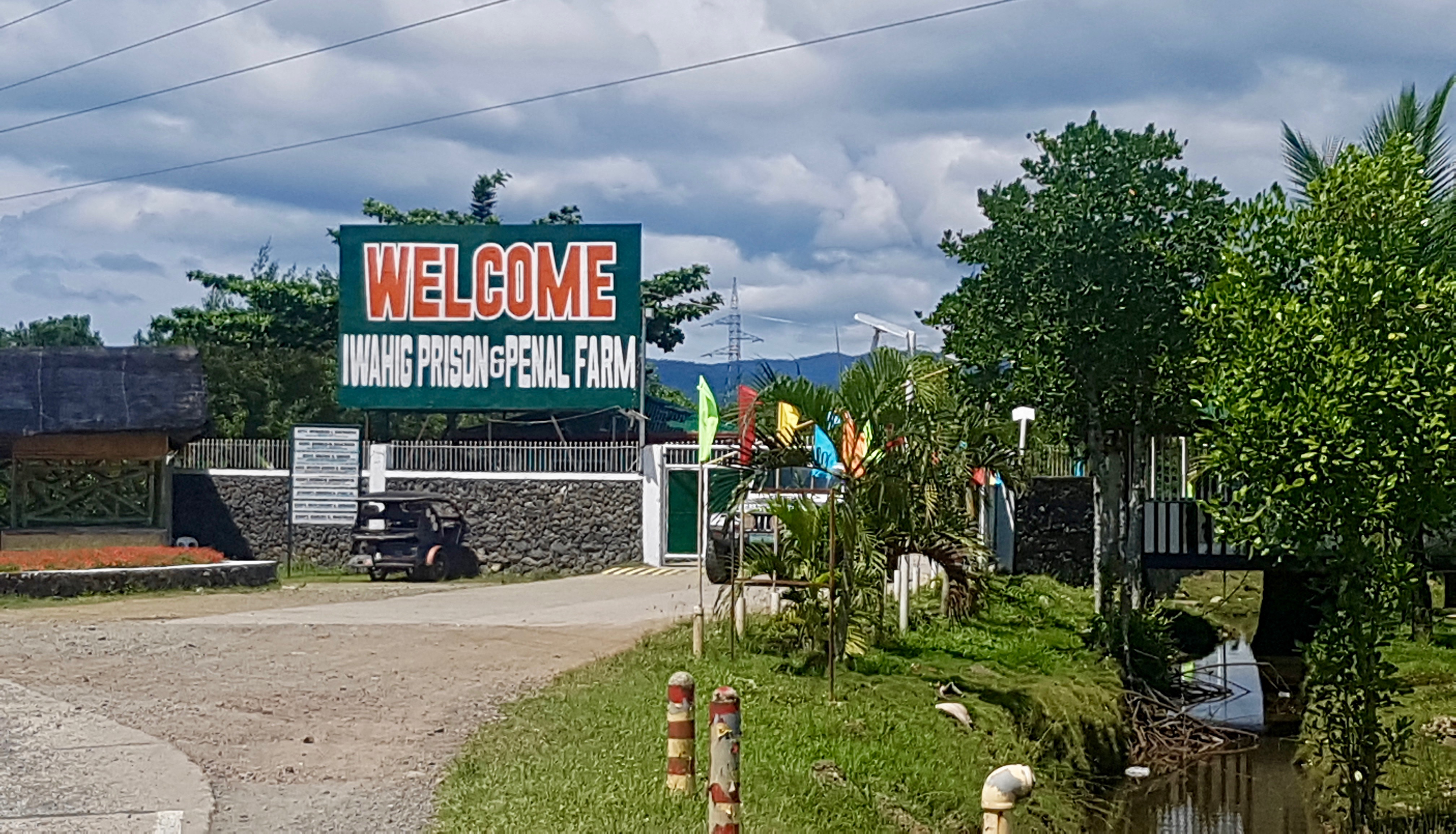 Iwahig Prison Farm, Puerto Princesa, Palawan.